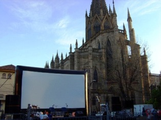 Festival Internacional de Cine en Guadalajara (FICG). Función realizada al aire libre con la Pantalla Inflable AIRSCREEN que por las ventajas en diseño y material y su fácil de montaje, ofrece una propuesta innovadora para los amantes del cine. Ya que se disfruta de exhibiciones cinematograficas en exteriores con una ambientación urbana (natural) y excelente calidad de imagen.